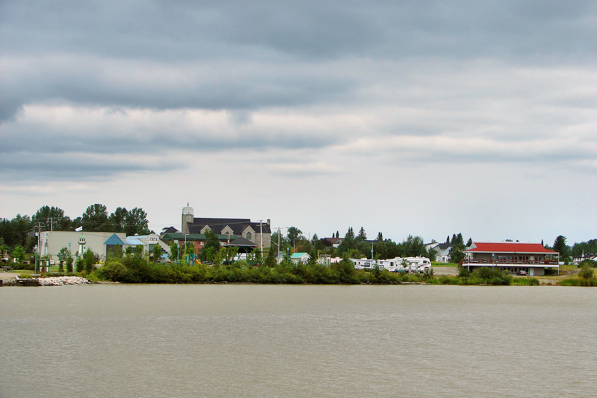 Macamic, Quebec, Canada